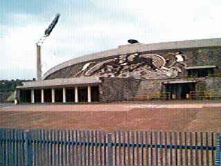 Estadio de la ciudad universitaria, UNAM, México. El Mural de Diego Rivera denominado "La Universidad, la familia mexicana, la paz y la juventud deportista" fue realizado en 1952.